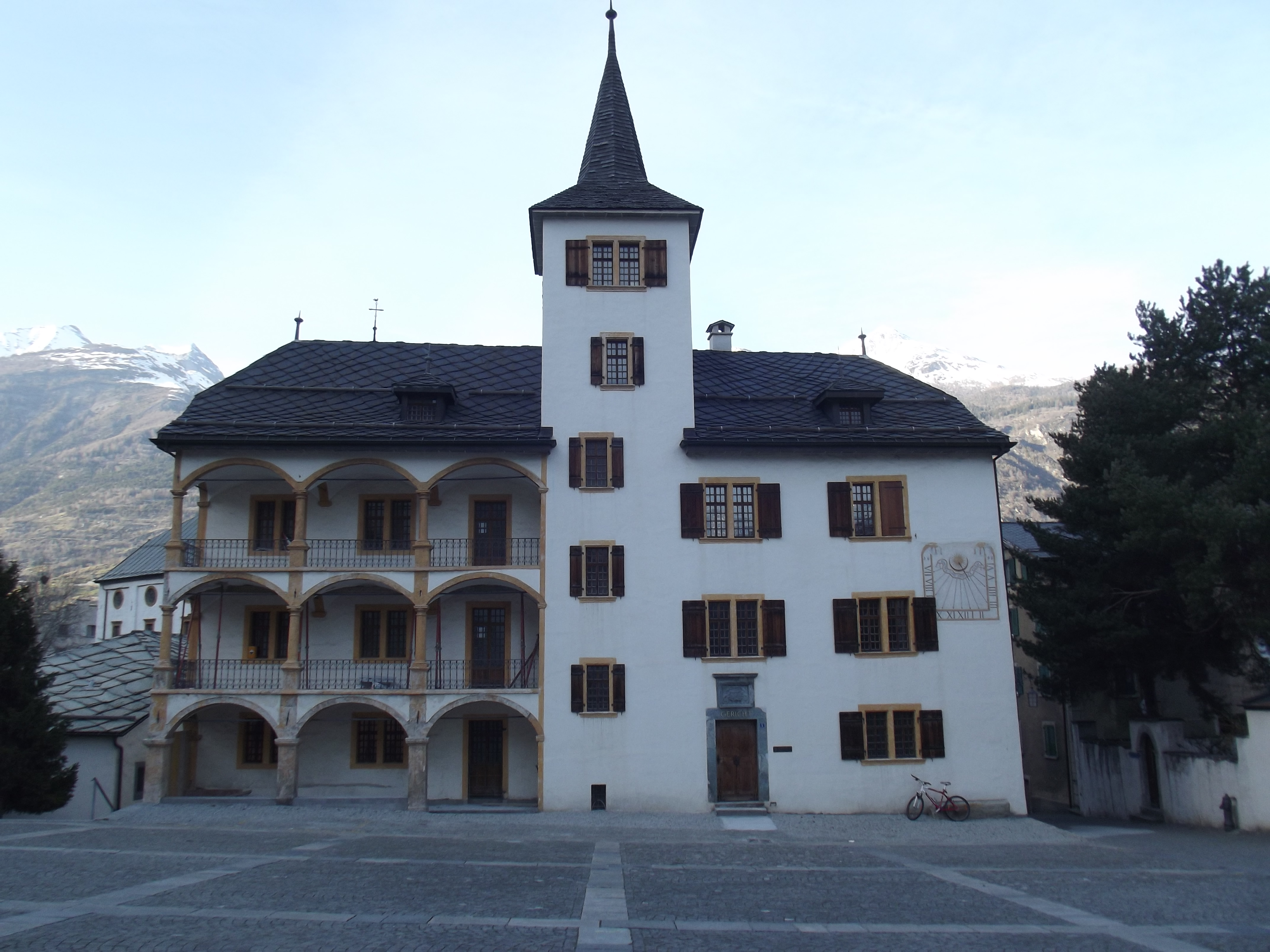 Raadhuis van het dorp